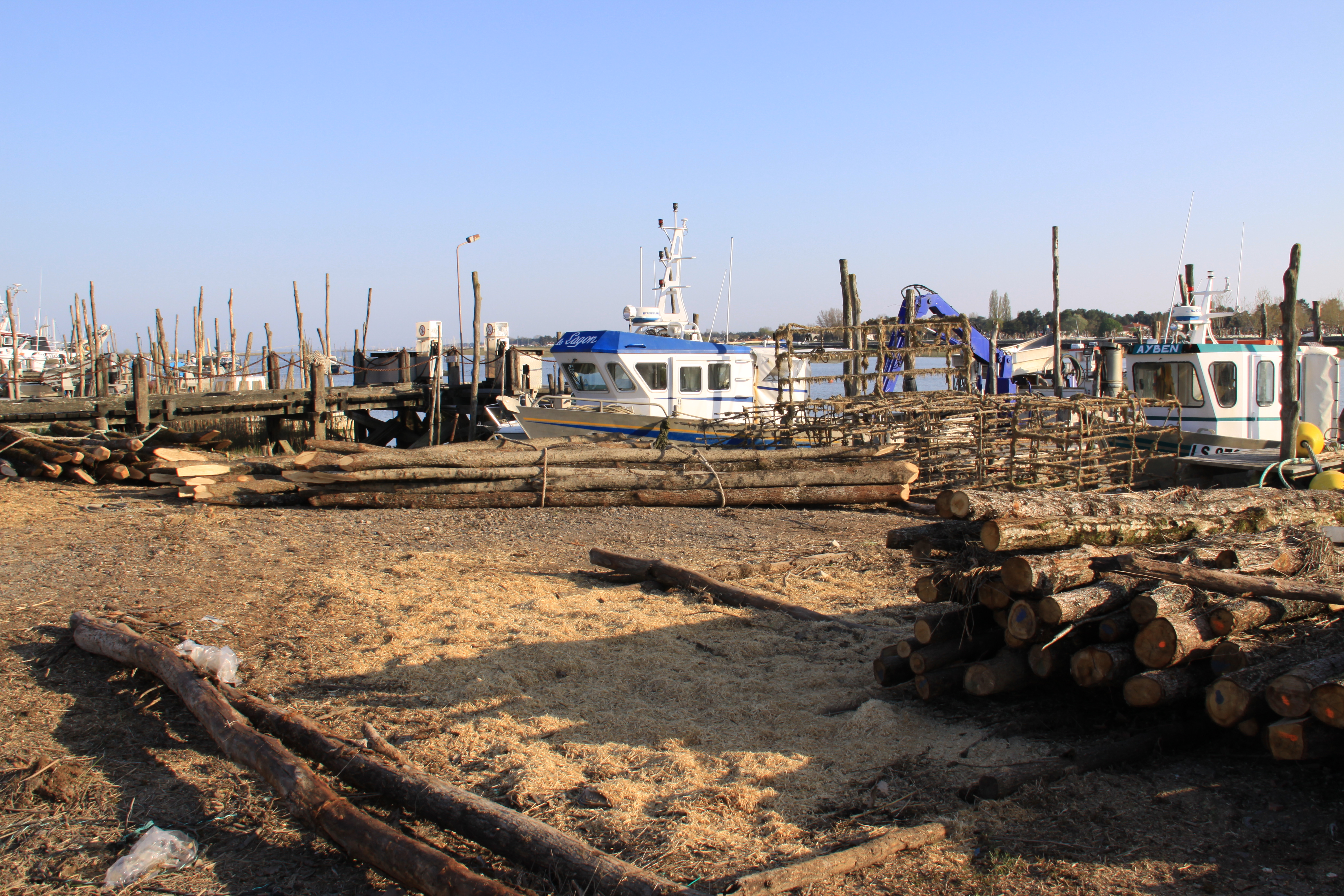 Des pieux à moules (bouchots) en attente d' être taillés et d' autres prets à être installés dans les parcs à moules (appelés aussi "bouchots"). L' Aiguillon-sur-Mer, Vendée, France.